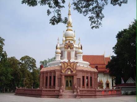 มหาเจดีย์บูรพาจารย์